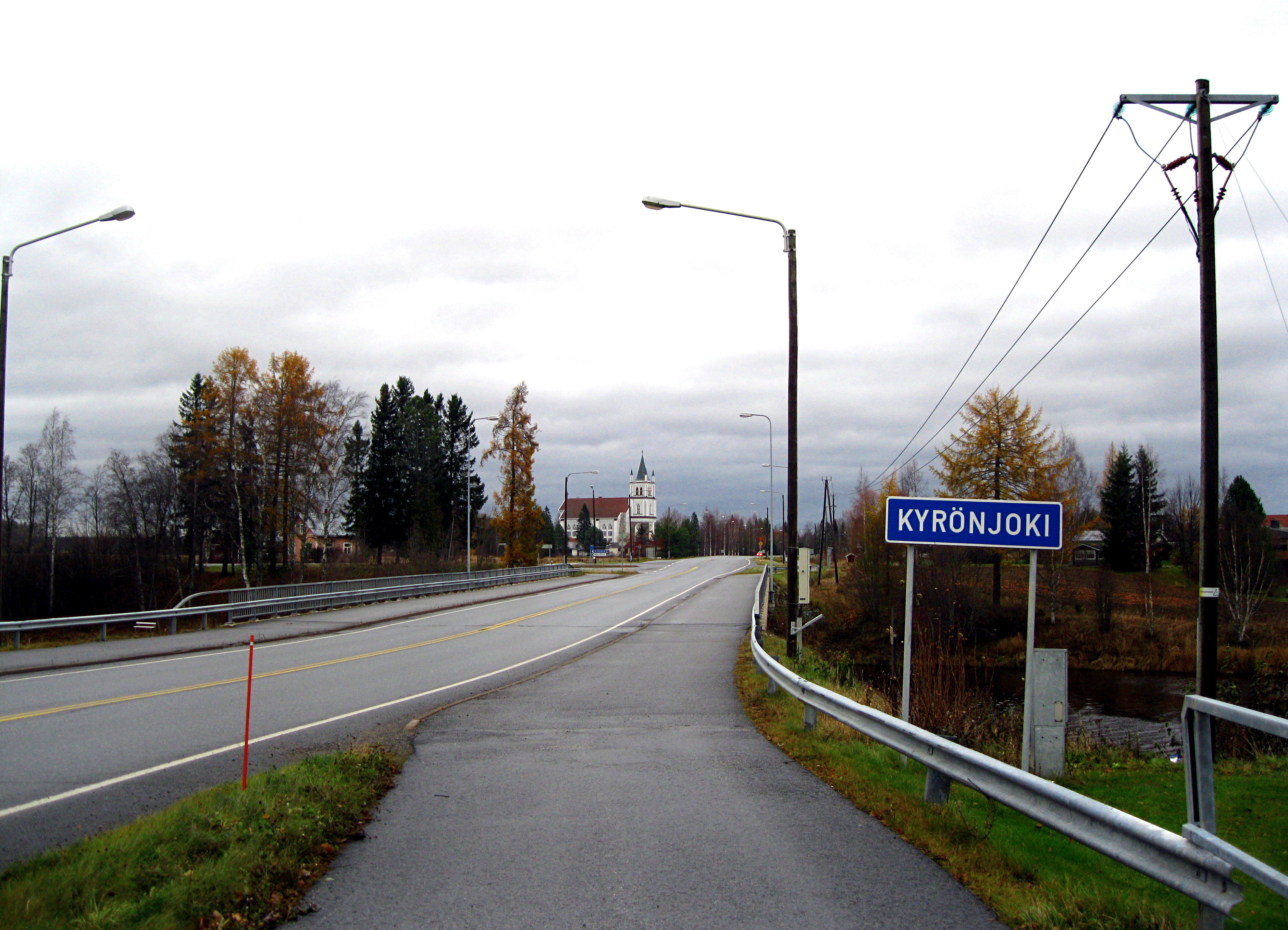 Kyrönjoen ylittävä silta valtatiellä 16 Seinäjoen Ylistarossa.